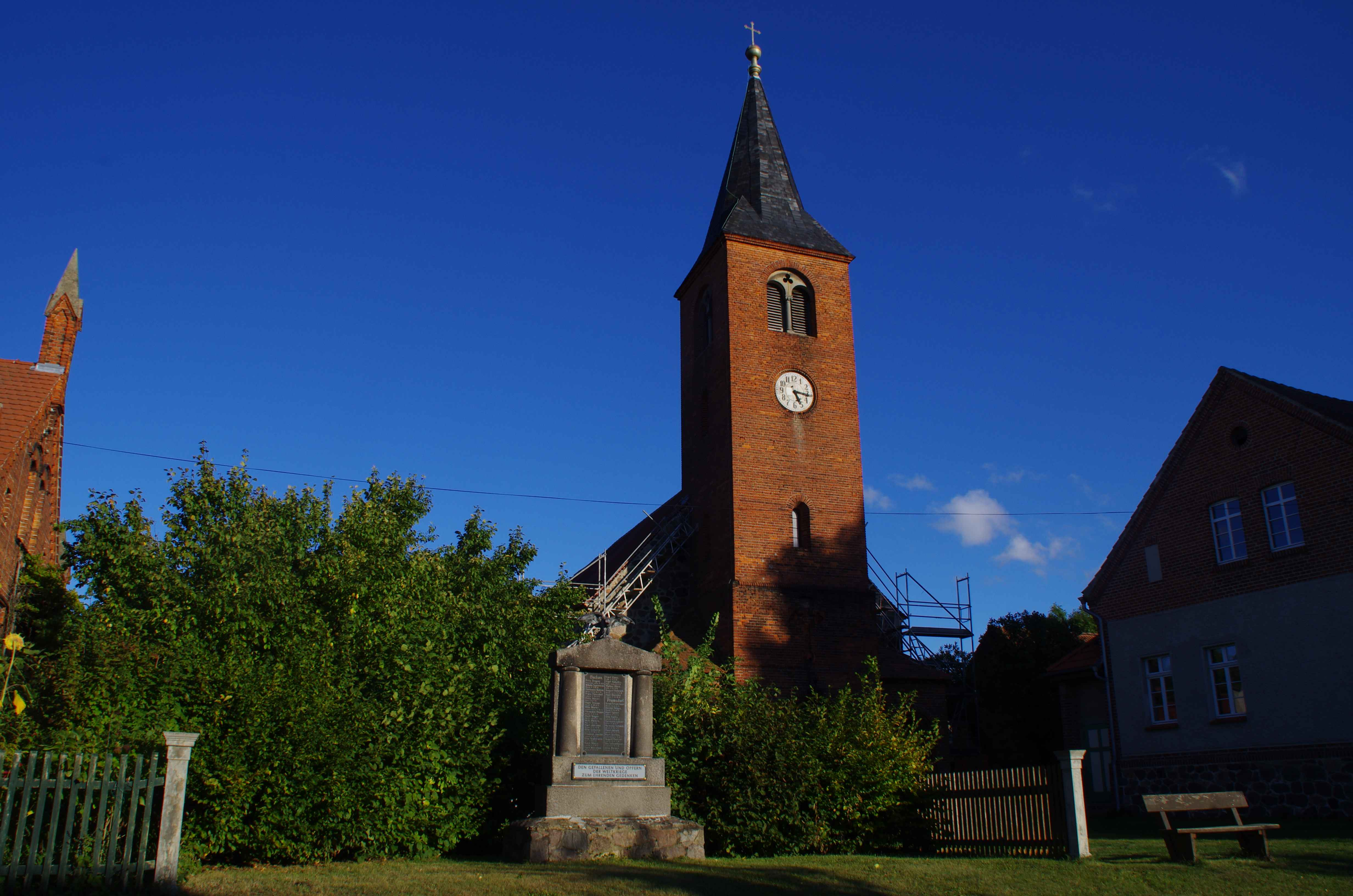 Buckautal in Brandenburg. Die dorfkirche steht unter Denkmalschutz.